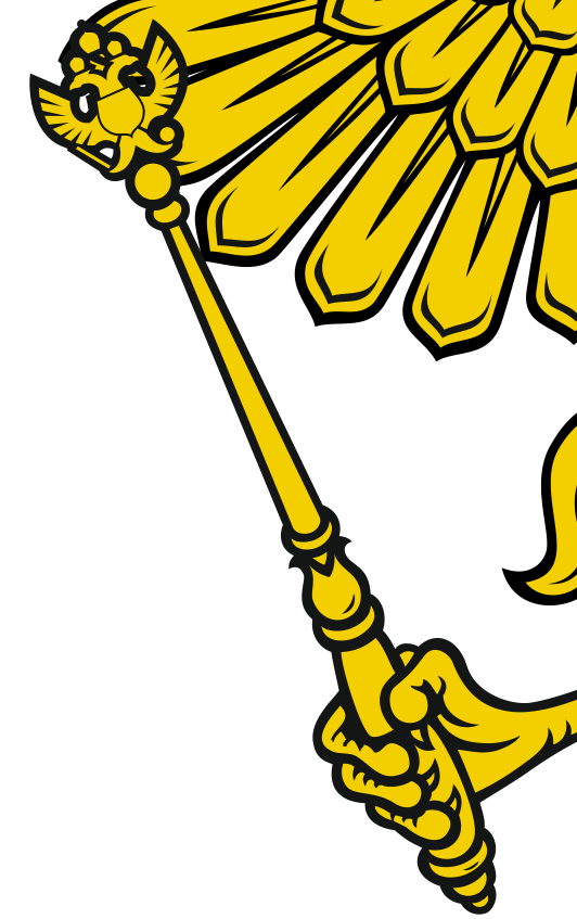 Скипетр на гербе России